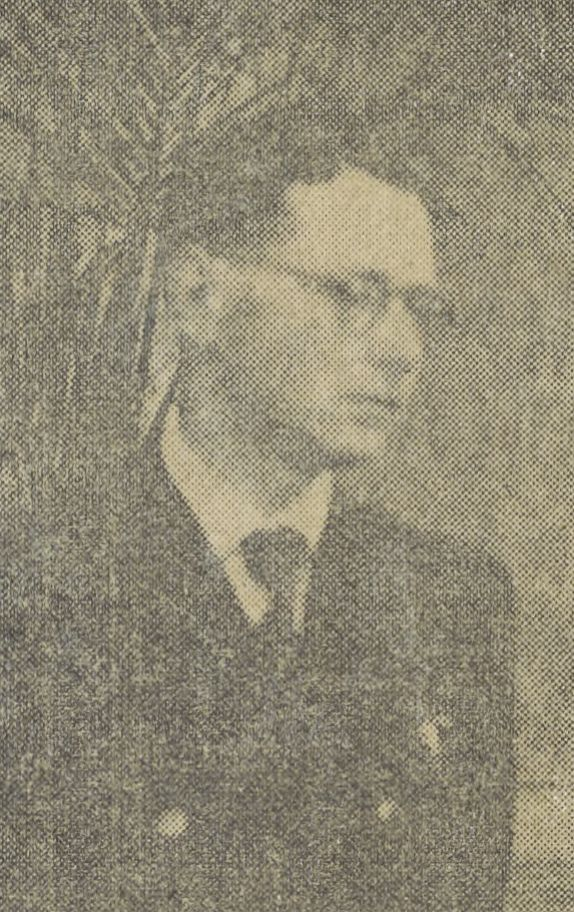 Roparz Hemon, photo publiée dans L'Heure Bretonne du 13 juin 1942, et prise lors d'un congrès de l'institut celtique